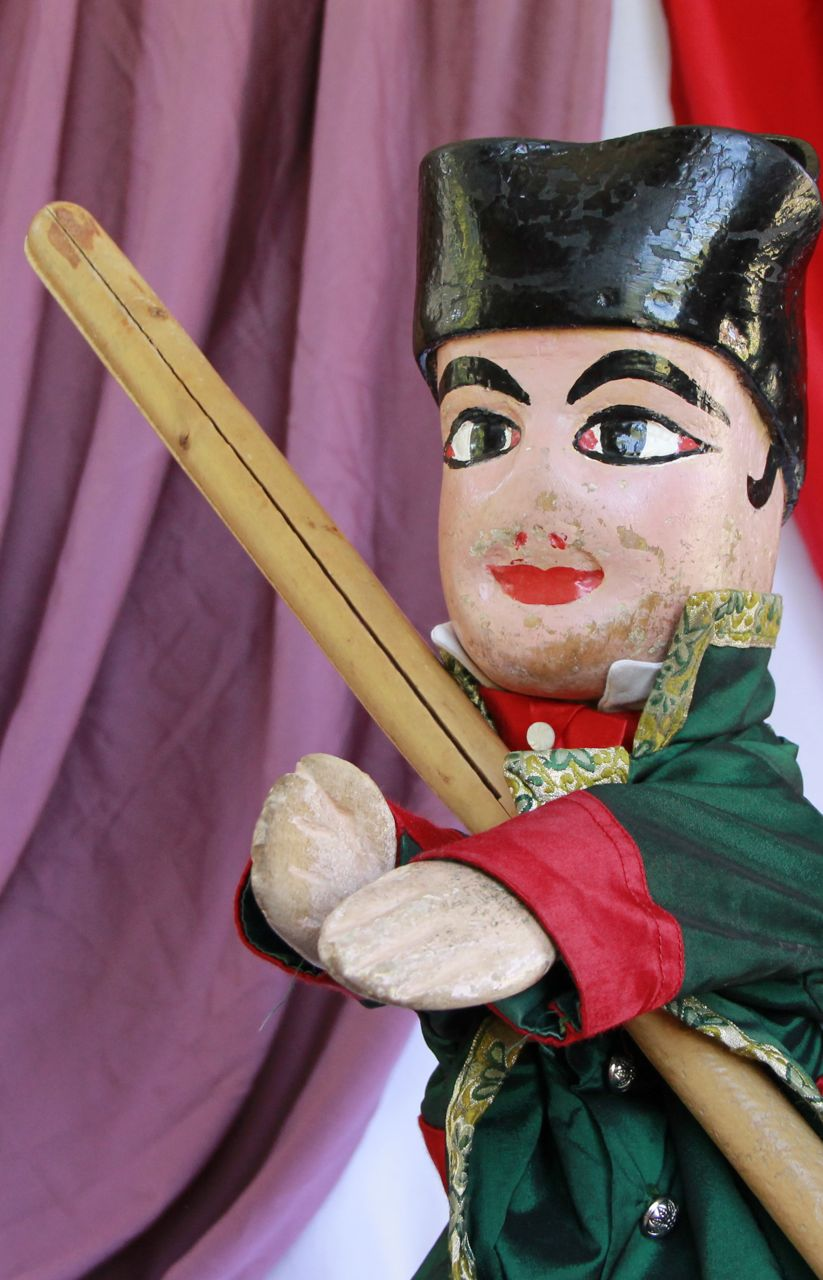 Marionnette centenaire de Guignol du Guignol Guérin, seul Guignol a être vétu de vert